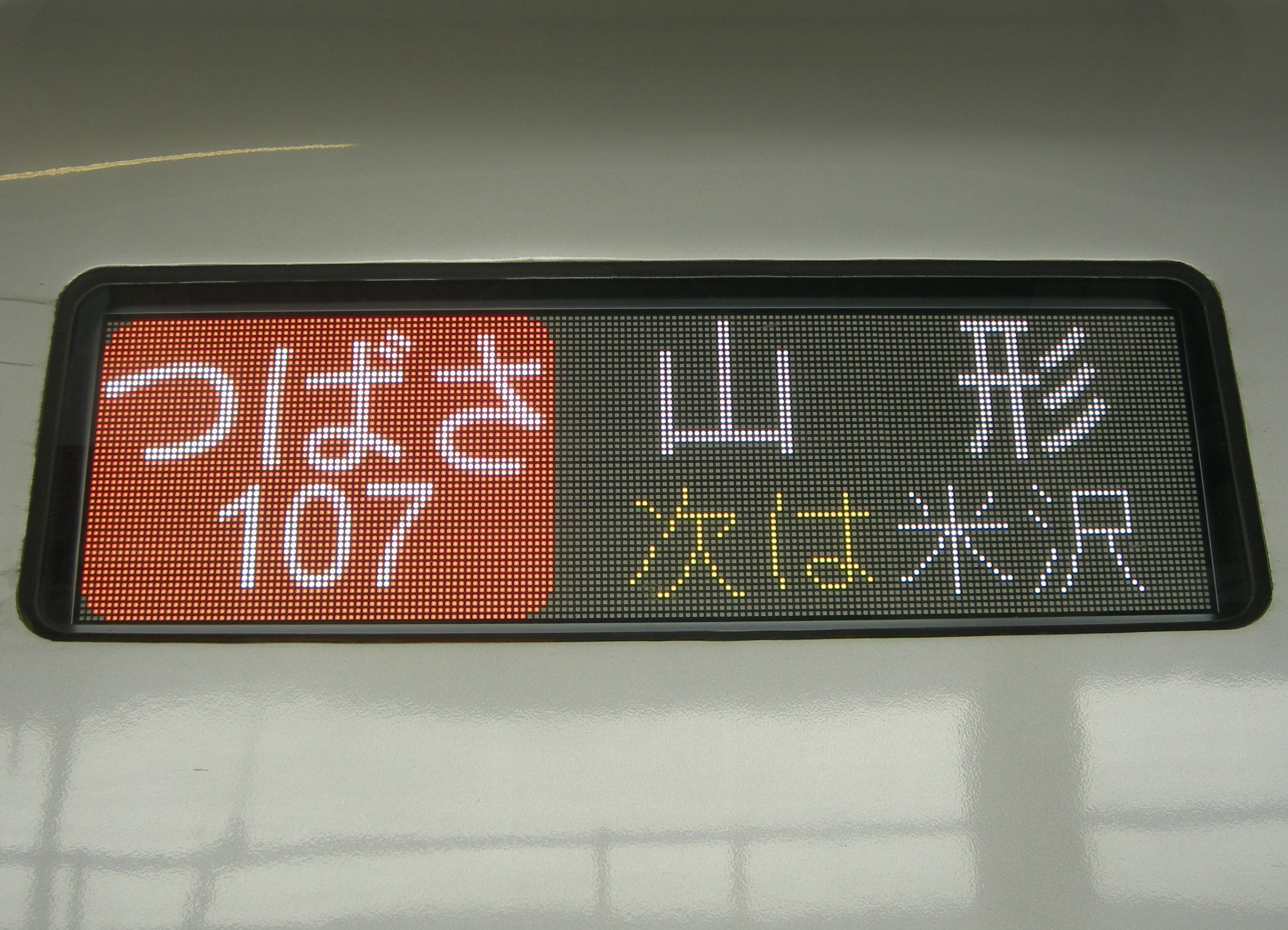 新幹線E3系電車2000番台行先表示